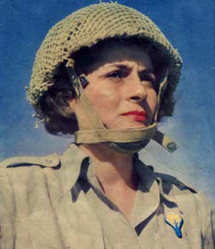 יוכבד קאשי במדי צה"ל עם אות הצנחן